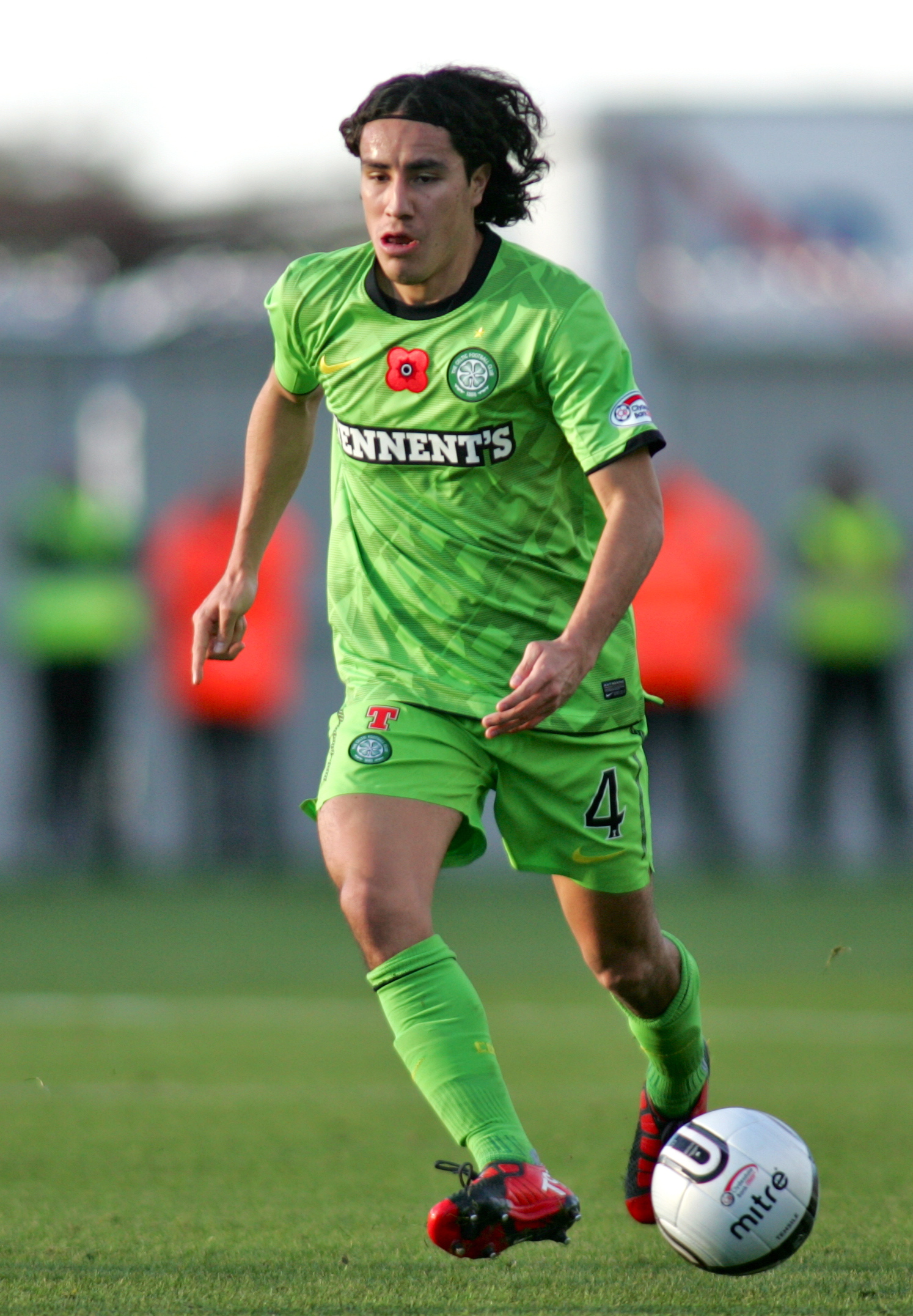 HI7Y0134